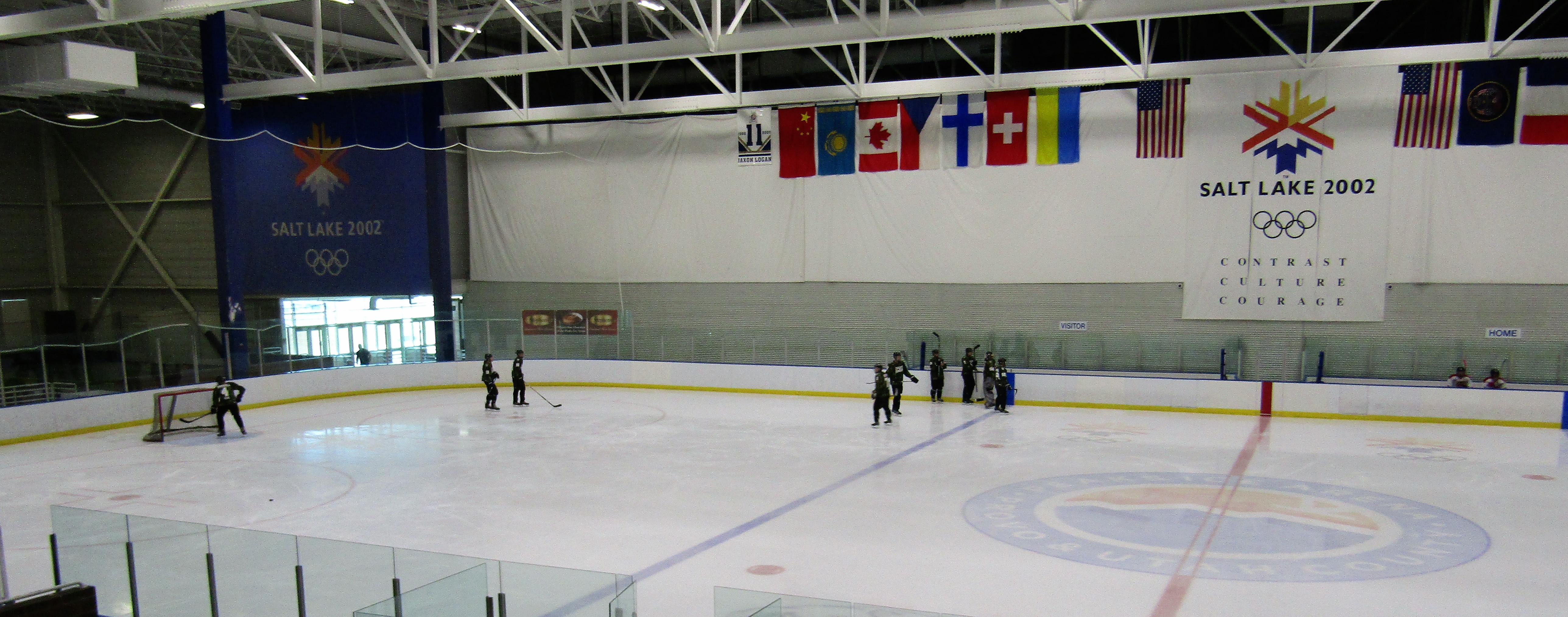 Ice skating rink in Peaks Ice Arena.